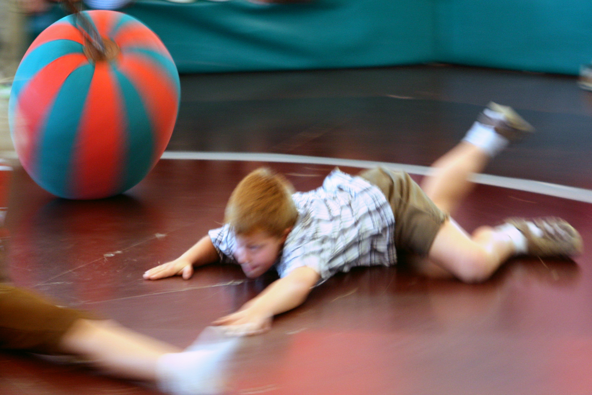 Teufelsrad auf dem Oktoberfest 2011.